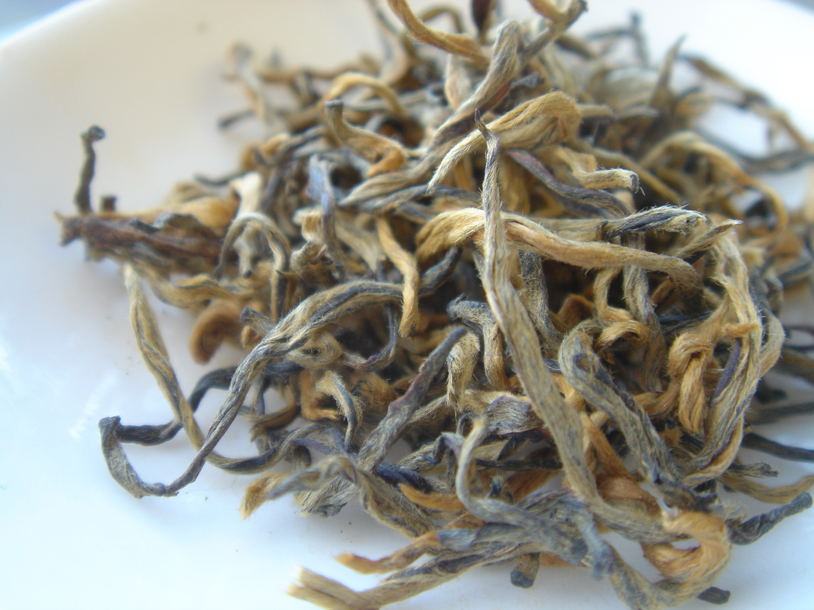 2007 spring Golden-bud Dian hong